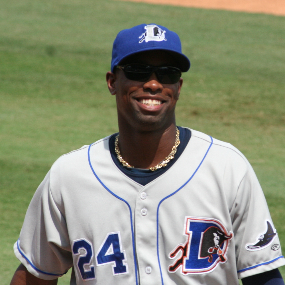 Leslie Anderson